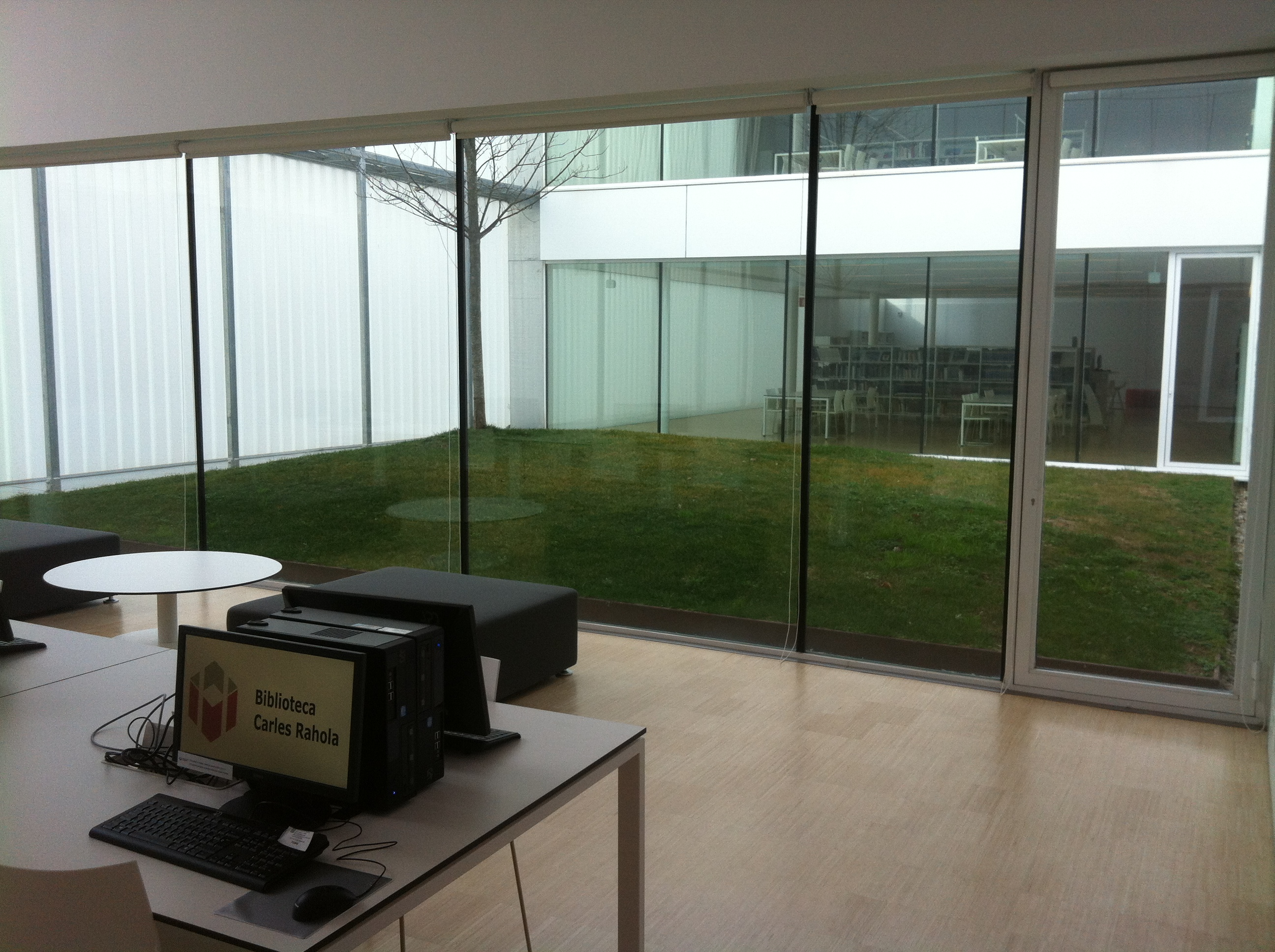 Interiors Biblioteca Carles Rahola Girona gener 2015